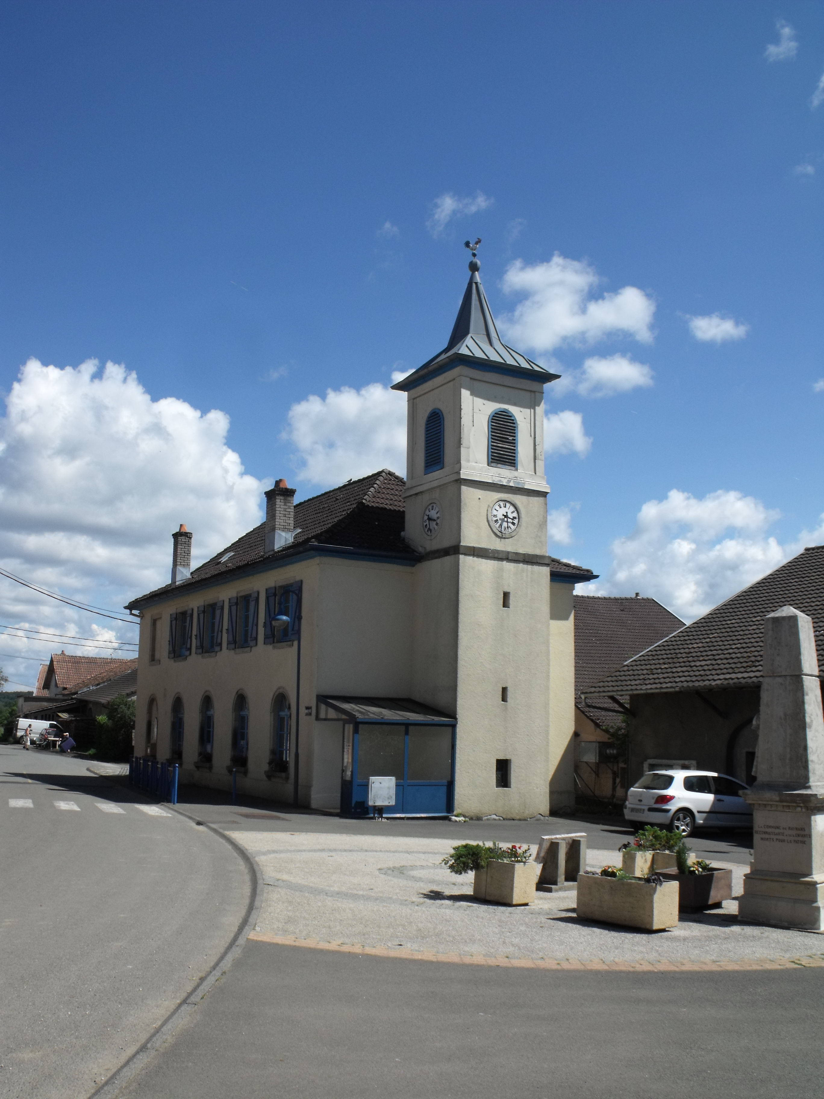 Ecole de Raynans, Département du Doubs, France